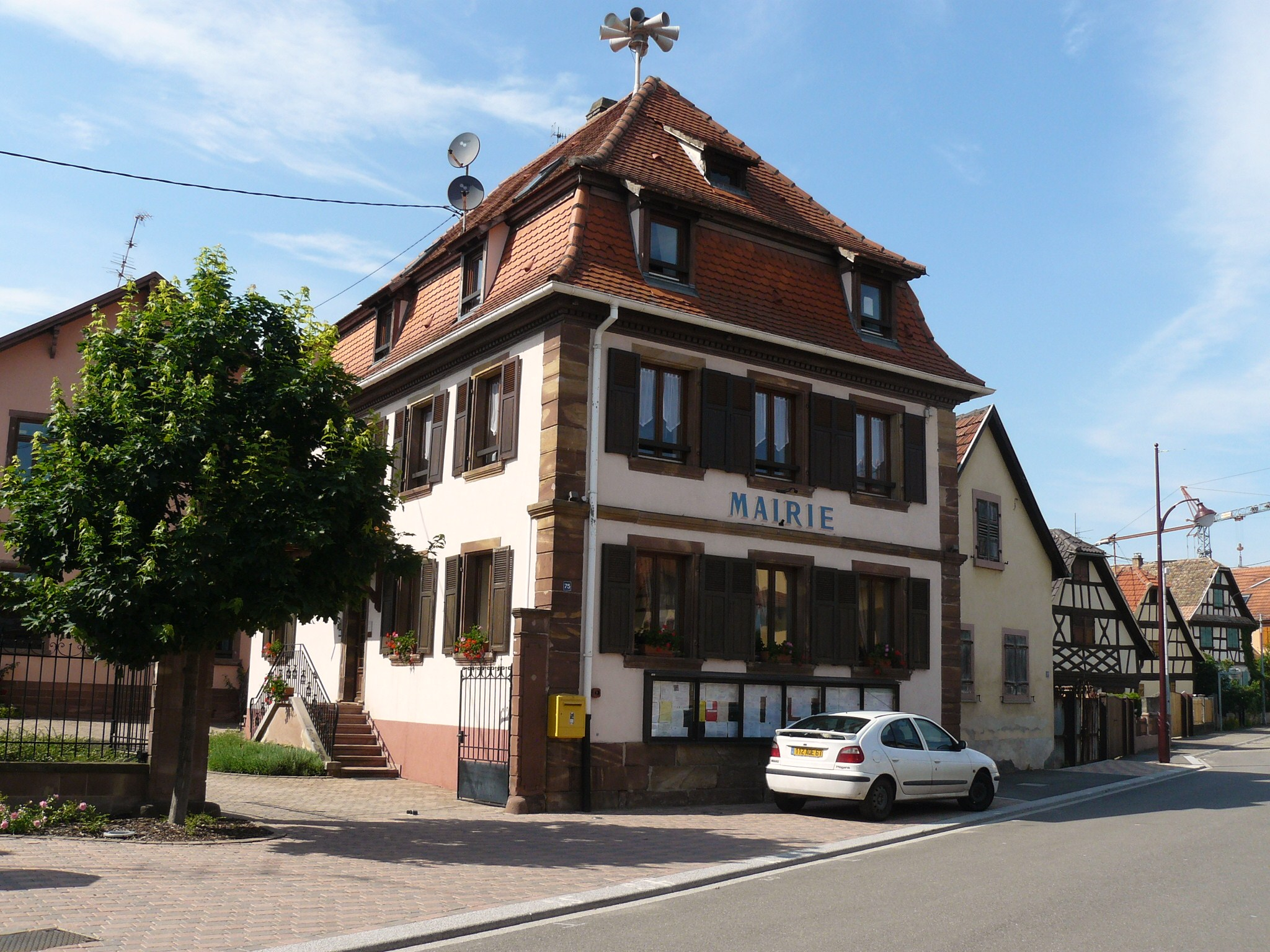 Mairie du village